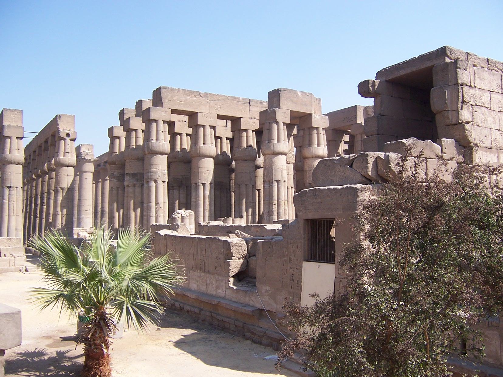 Luxor Temple at Luxor, Egypt